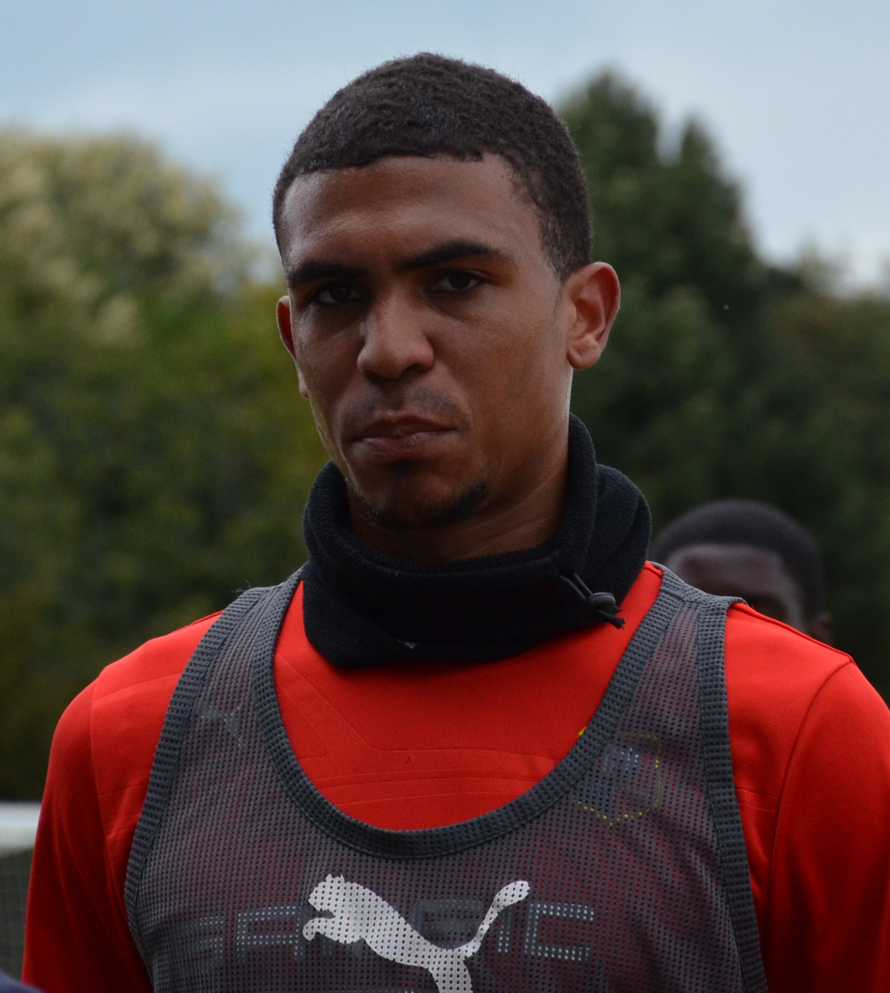 Photo prise lors du match de Championnat de France amateur 2 de football opposant le FC Saint-Lô au Stade rennais. Ici, Cédric Hountondji à l'issue de l'échauffement.